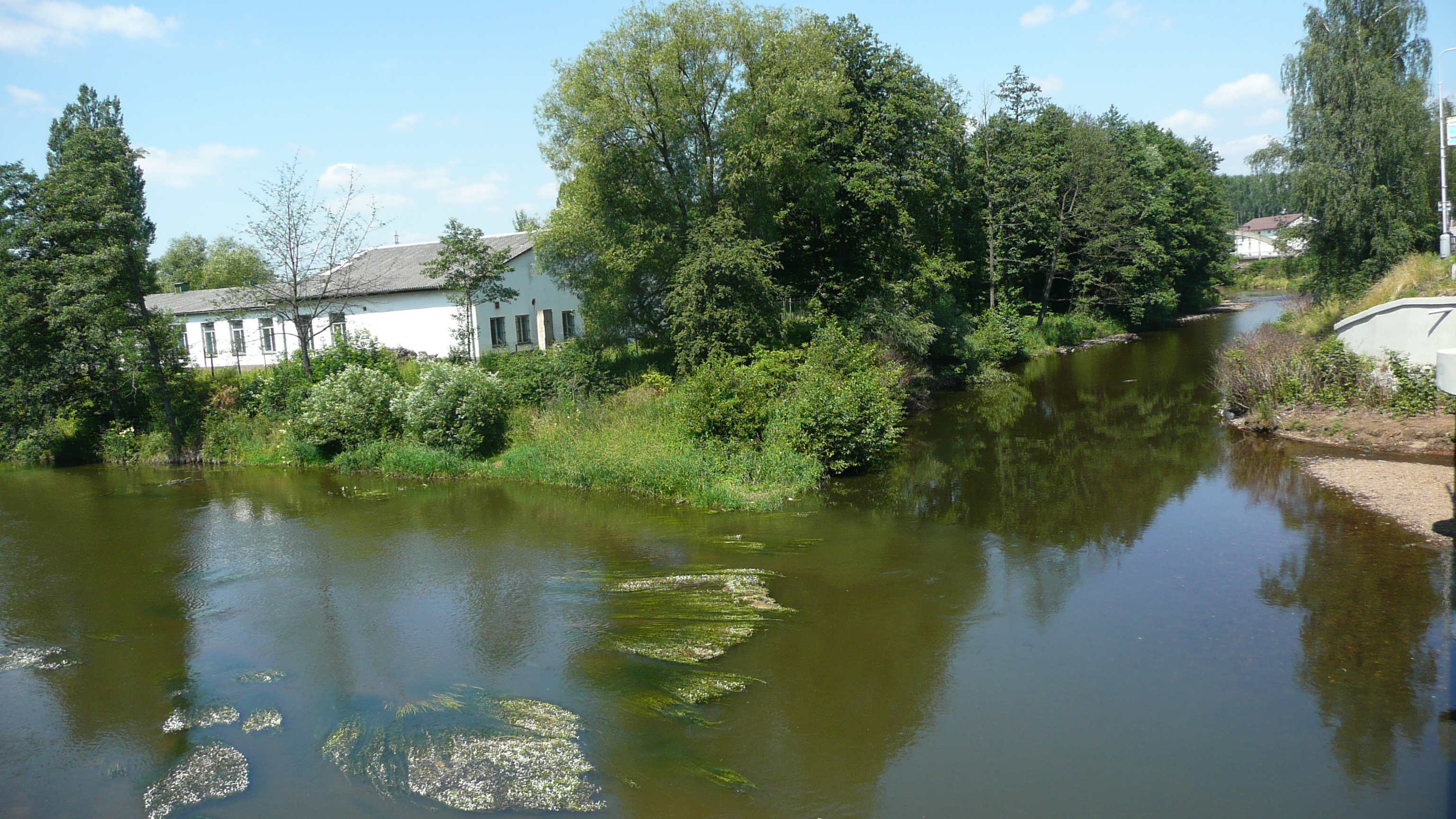 Soutok řeky Ohře a Svatava v Sokolově.